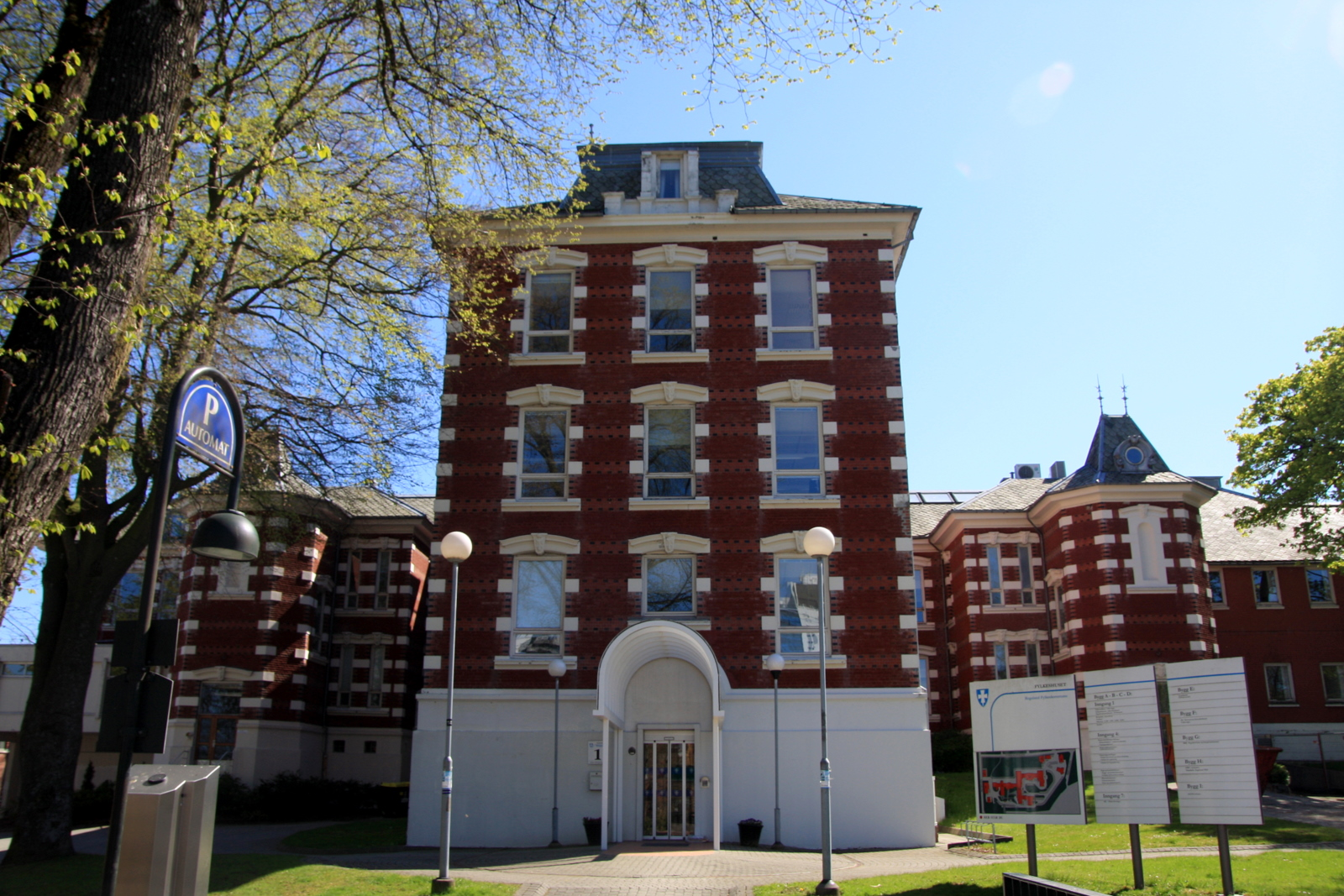 Stavanger sykehus, Stavanger